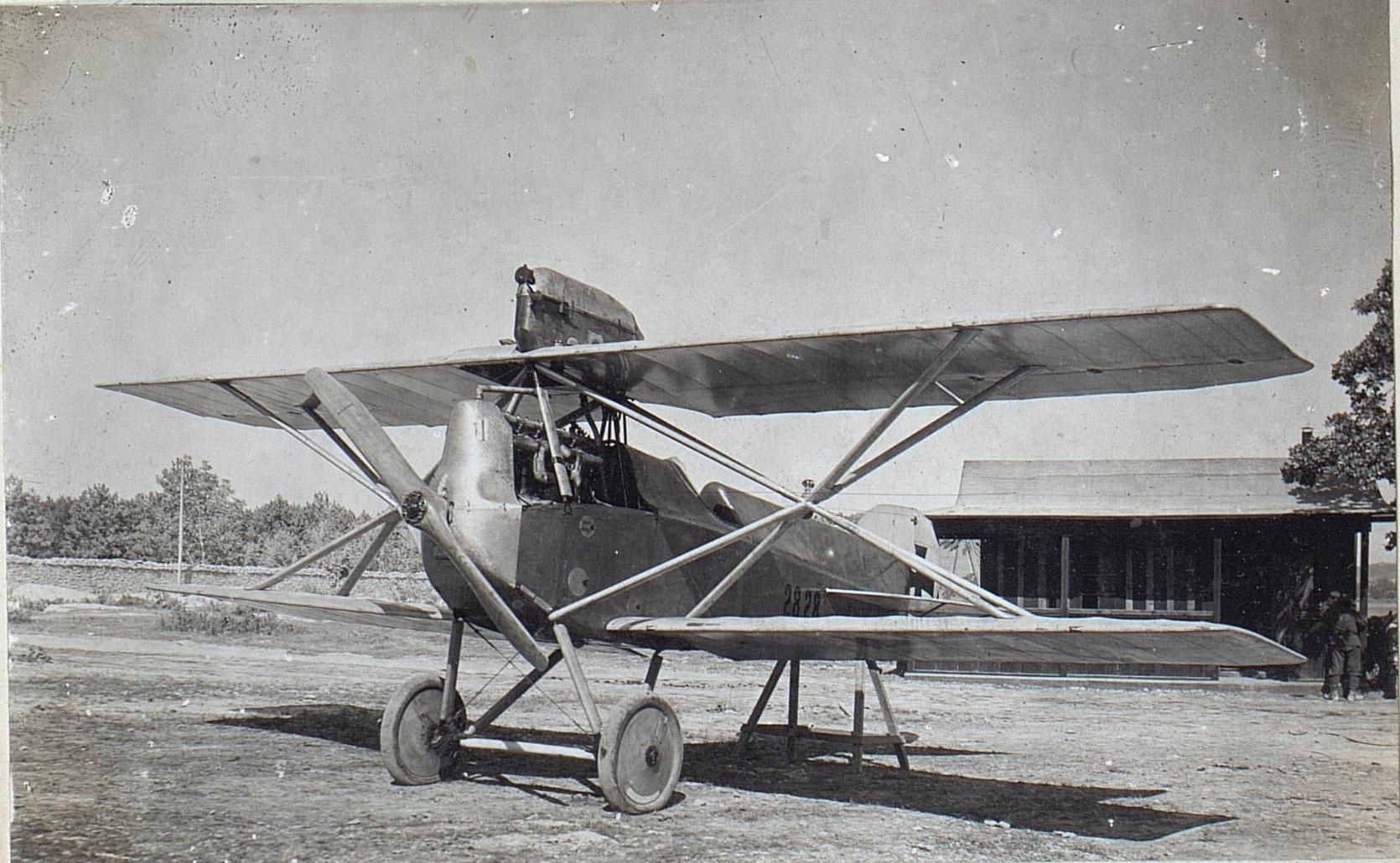 Albatros, Kampfflieger Einsitzer kleiner Typ. 21.6.1917.